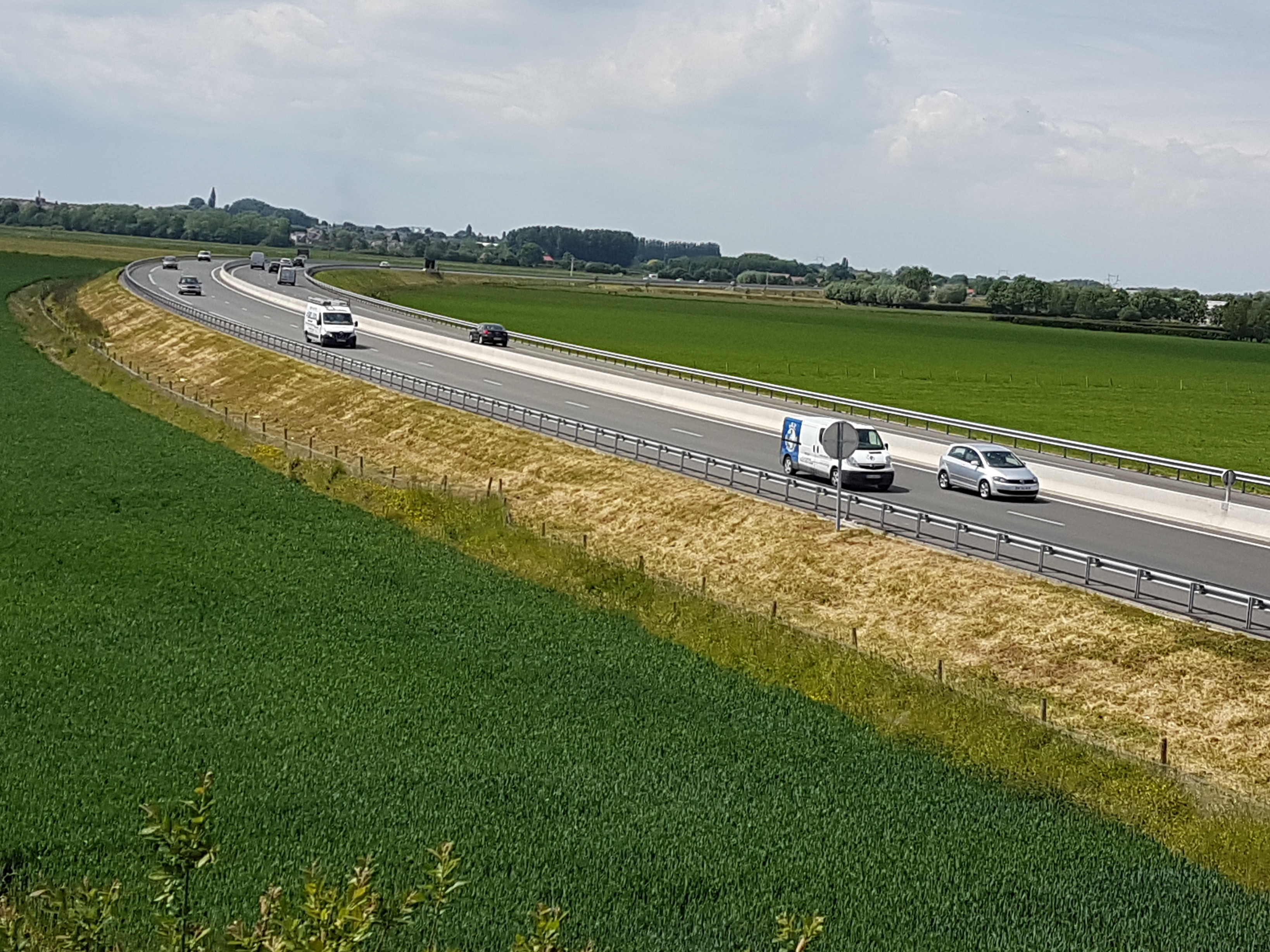 La RD642 (ex-RN42) à hauteur de Borre (Nord) Contournement du village